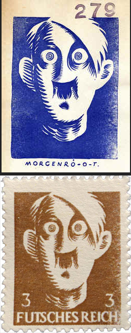 Von der OSS hergestellter Propagandaaufkleber, der eine Karikatur Hitlers zeigt. Dazu eine Briefmarken-Fälschung unbekannter Natur.